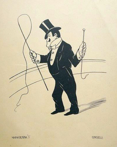 Директор Санкт-Петербургского цирка Сципионе Чинизелли (1864–1938) на карикатуре Поля Робера из альбома «Весь Петербург в карикатурах»